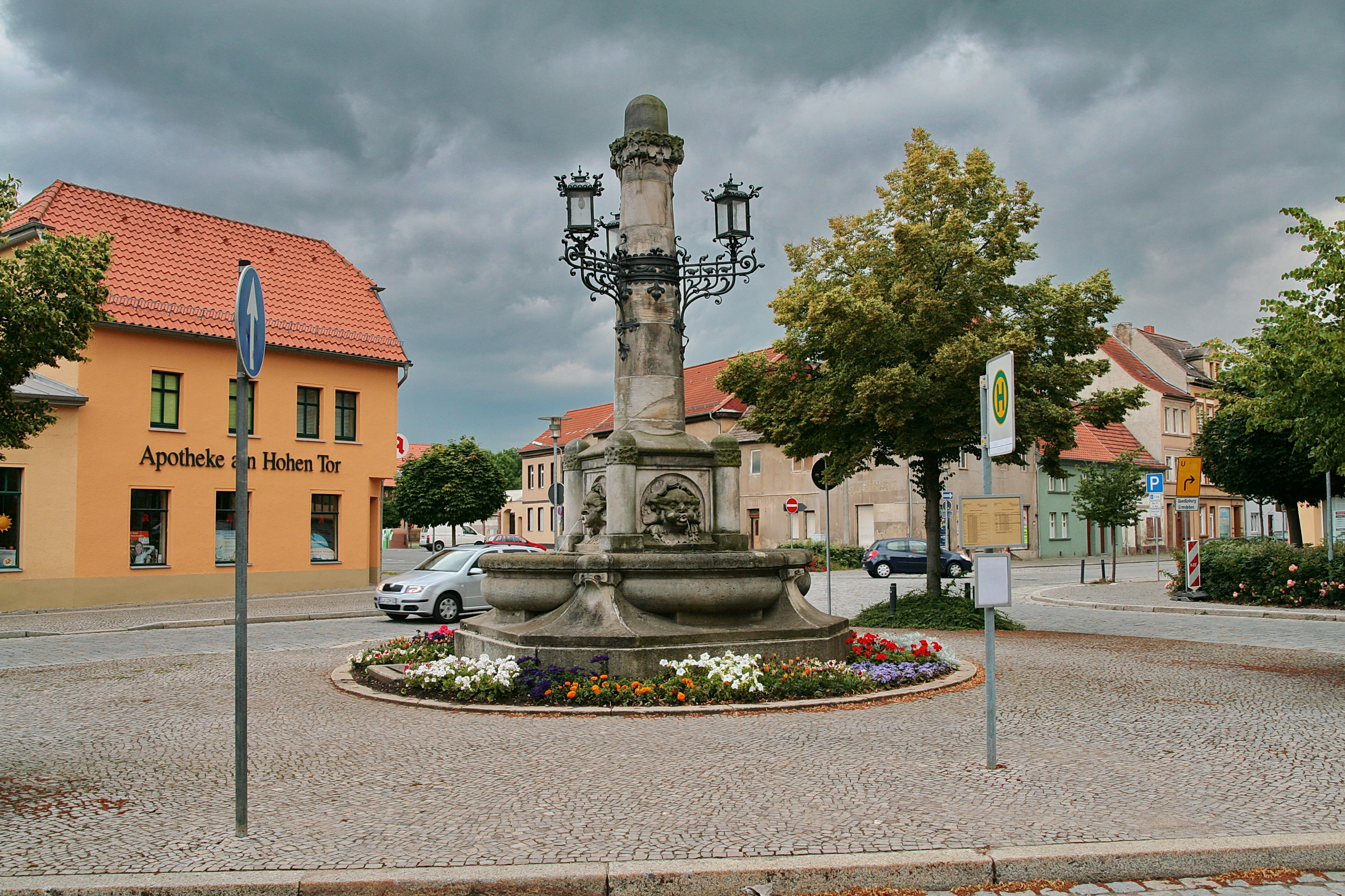 Kuntze-Brunnen am Hohen Tor in Aschersleben, Sachsen-Anhalt, Deutschland; erbaut 1904